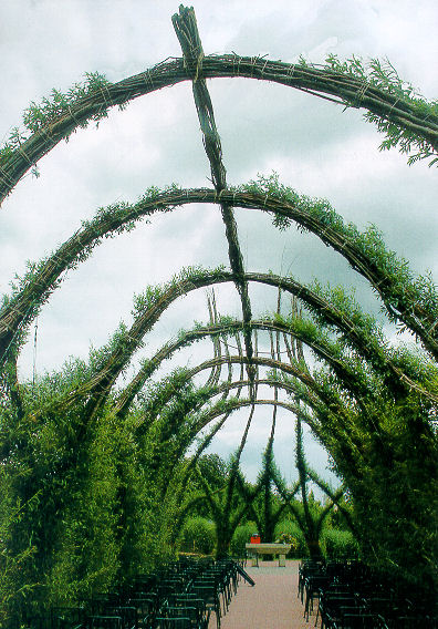 Weidenkirche auf dem Gelände der Landesgartenschau Kaiserslautern Für Wikipedia aufgearbeitet --Immanuel Giel 11:18, 12. Mai 2005 (CEST)